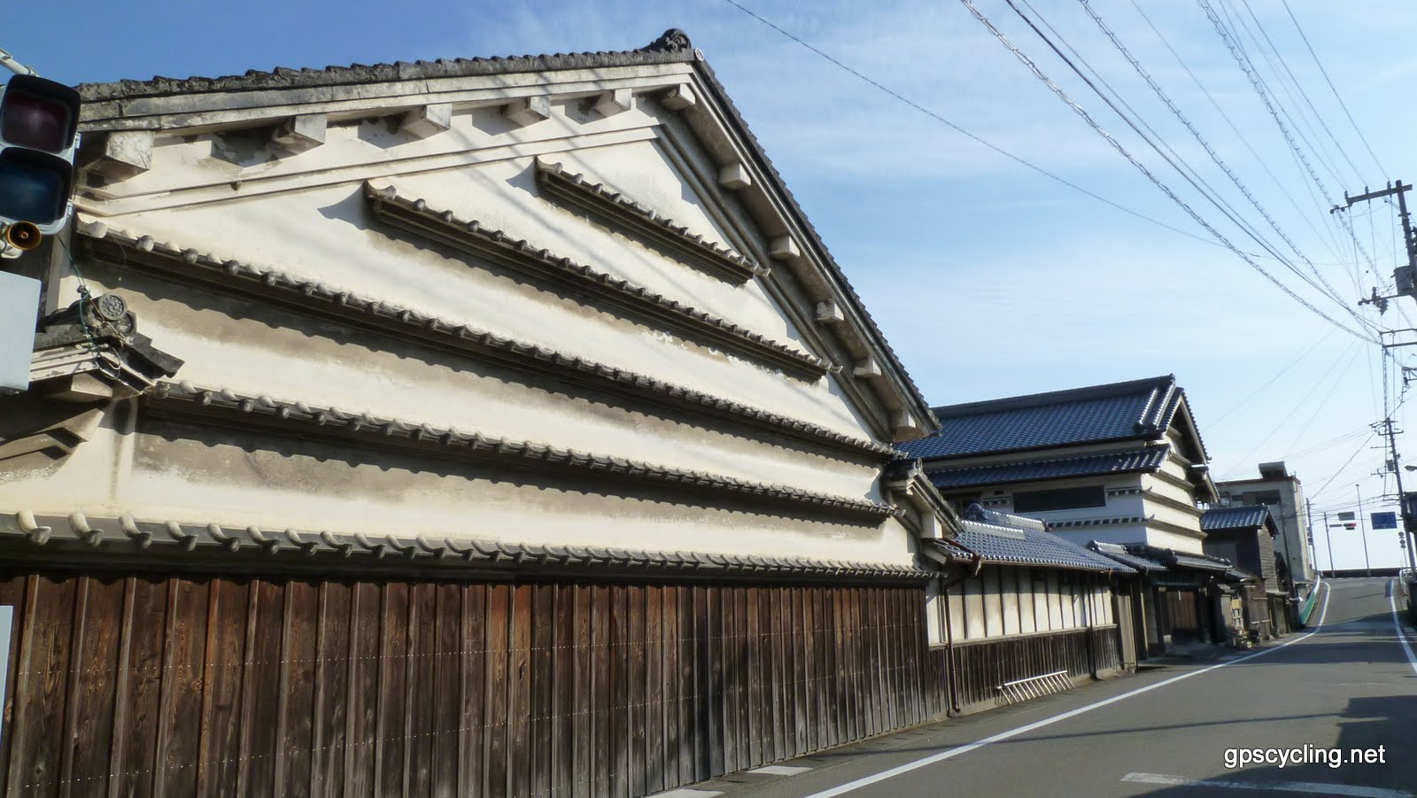 安芸郡安田町